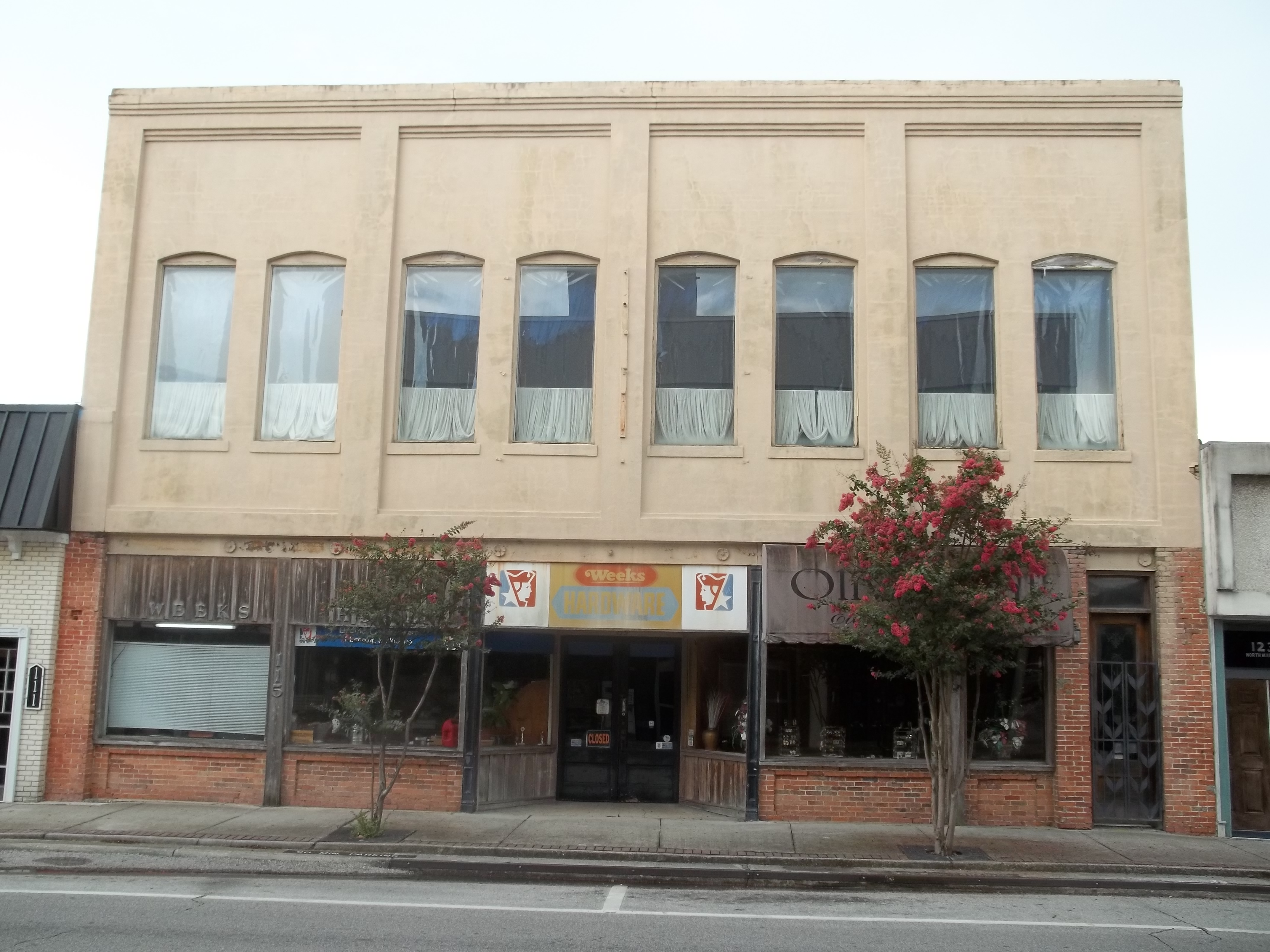 Brooksville, Florida: Weeks Hardware